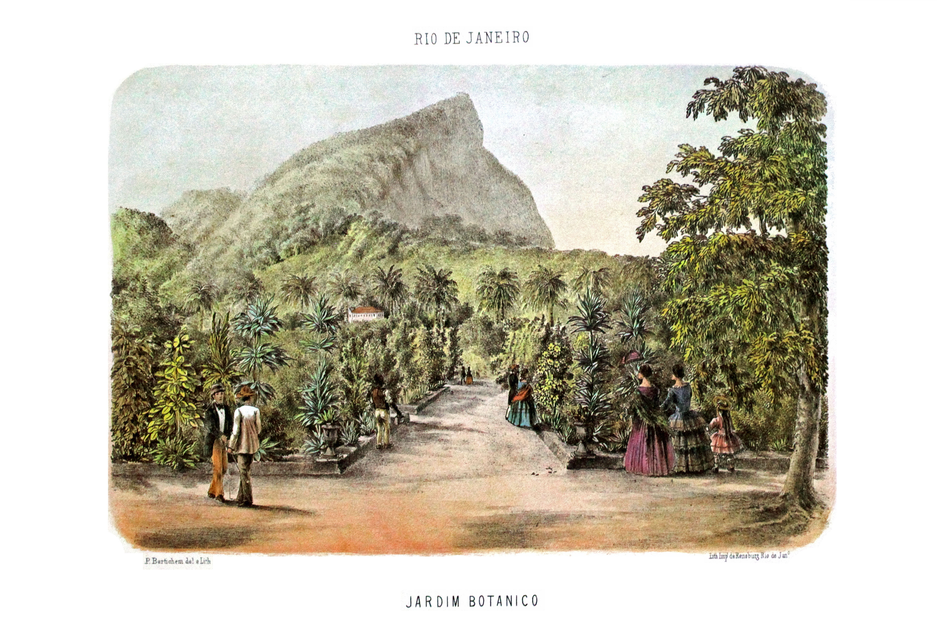 Bertichem - 1856 - Jardim Botânico do Rio de Janeiro